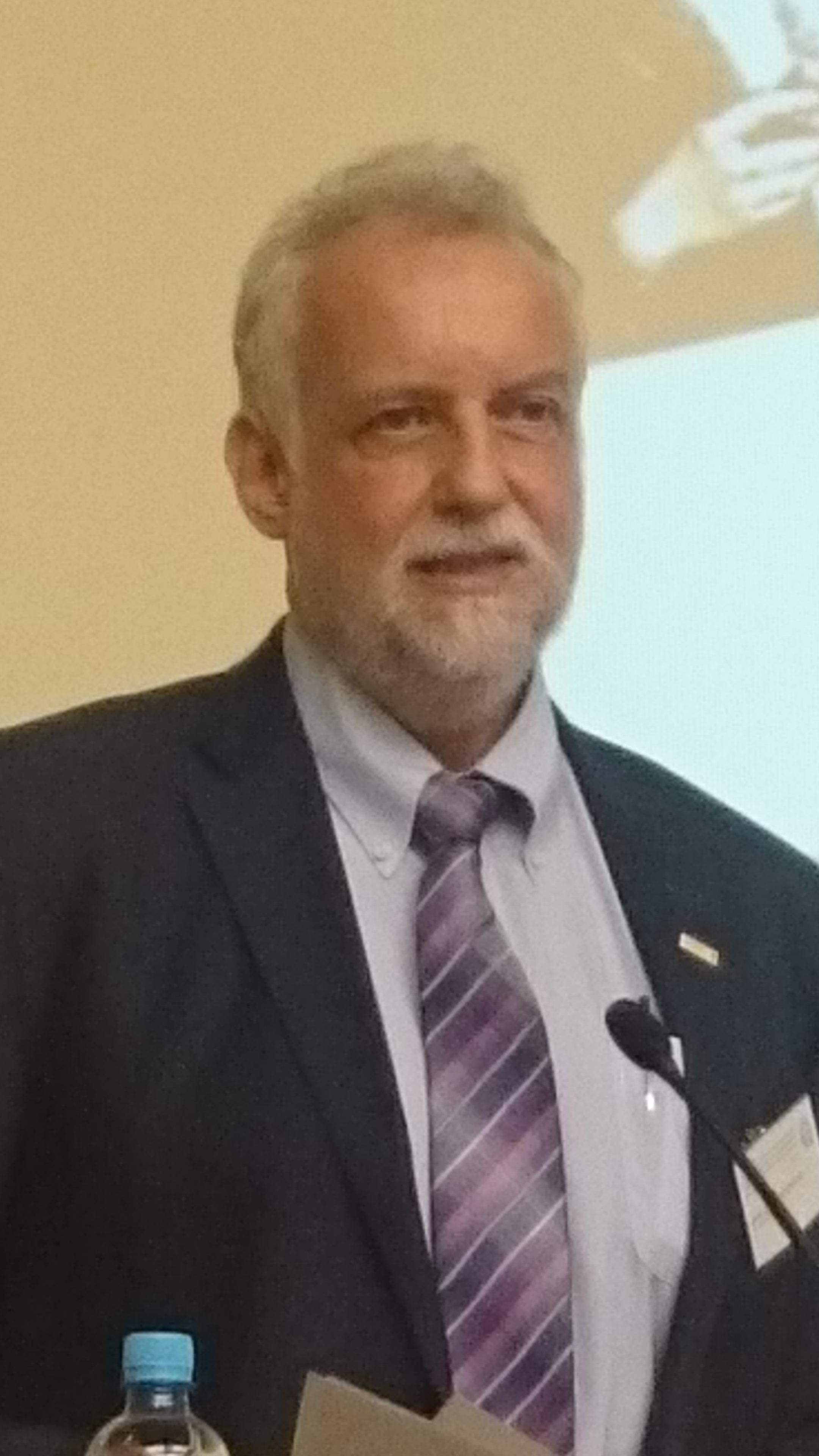 Рейнхольд Бошки